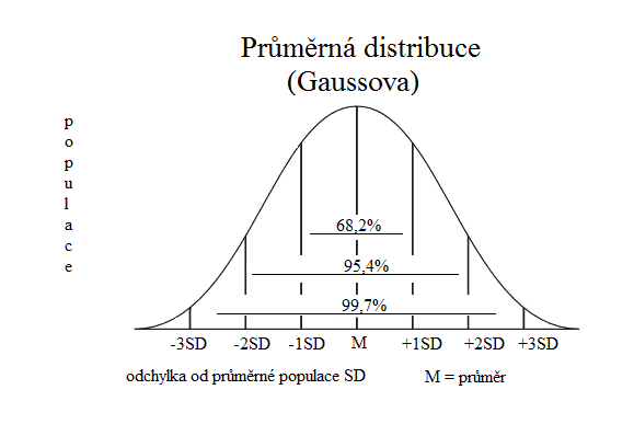 Normální distribuce v epidemiologii